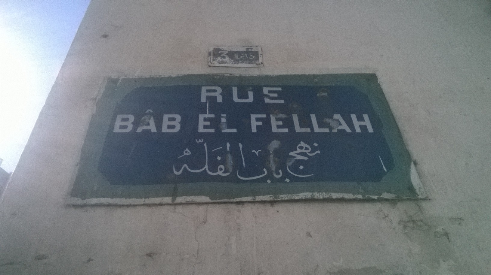 Sidi El Béchir, Tunis سيدي البشير ، تونس